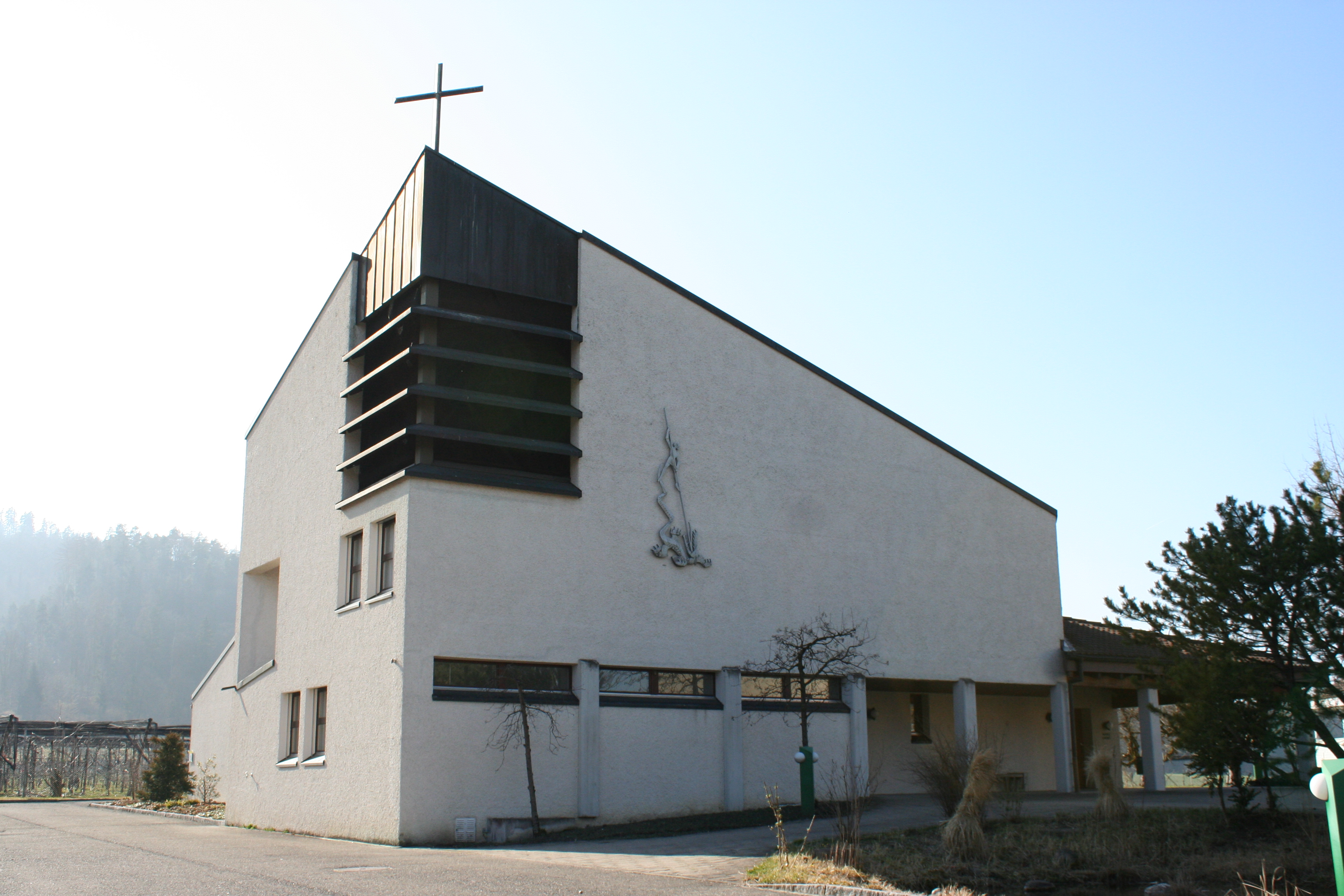 Römisch-katholische Pfarrkirche St. Georg Elgg